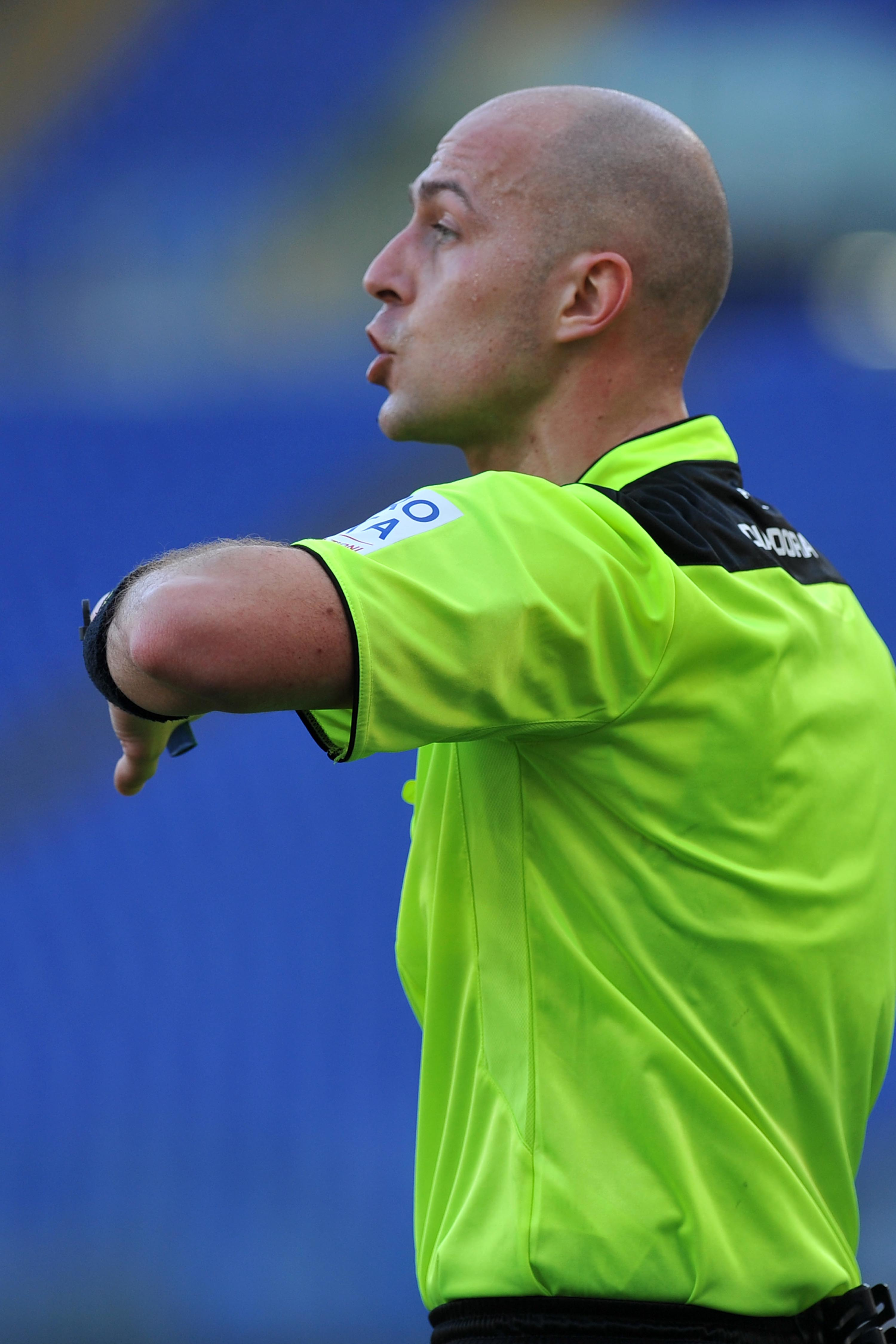 pairetto_profile